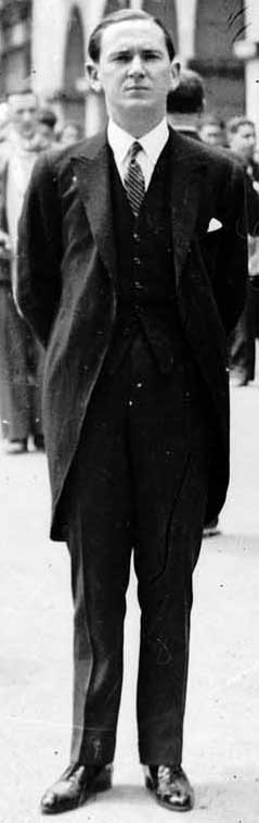 Telesforo Monzon politikaria 1934an.